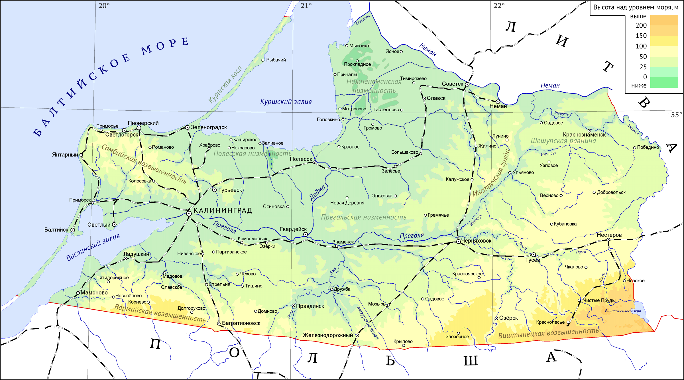 Карта Калининградской области. Вариация на тему карты авторства А. С. Савина